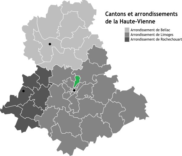 Canton de Limoges-Vigenal, Limousin, France en Carte des arrondissements de la Haute-Vienne